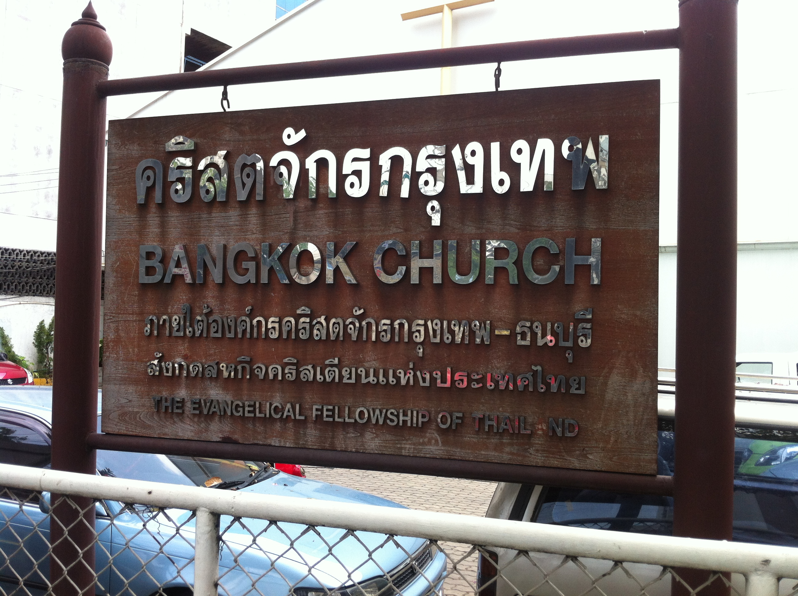 Bangkok Church on Si Ayuthaya Road, Bangkok, Thailand